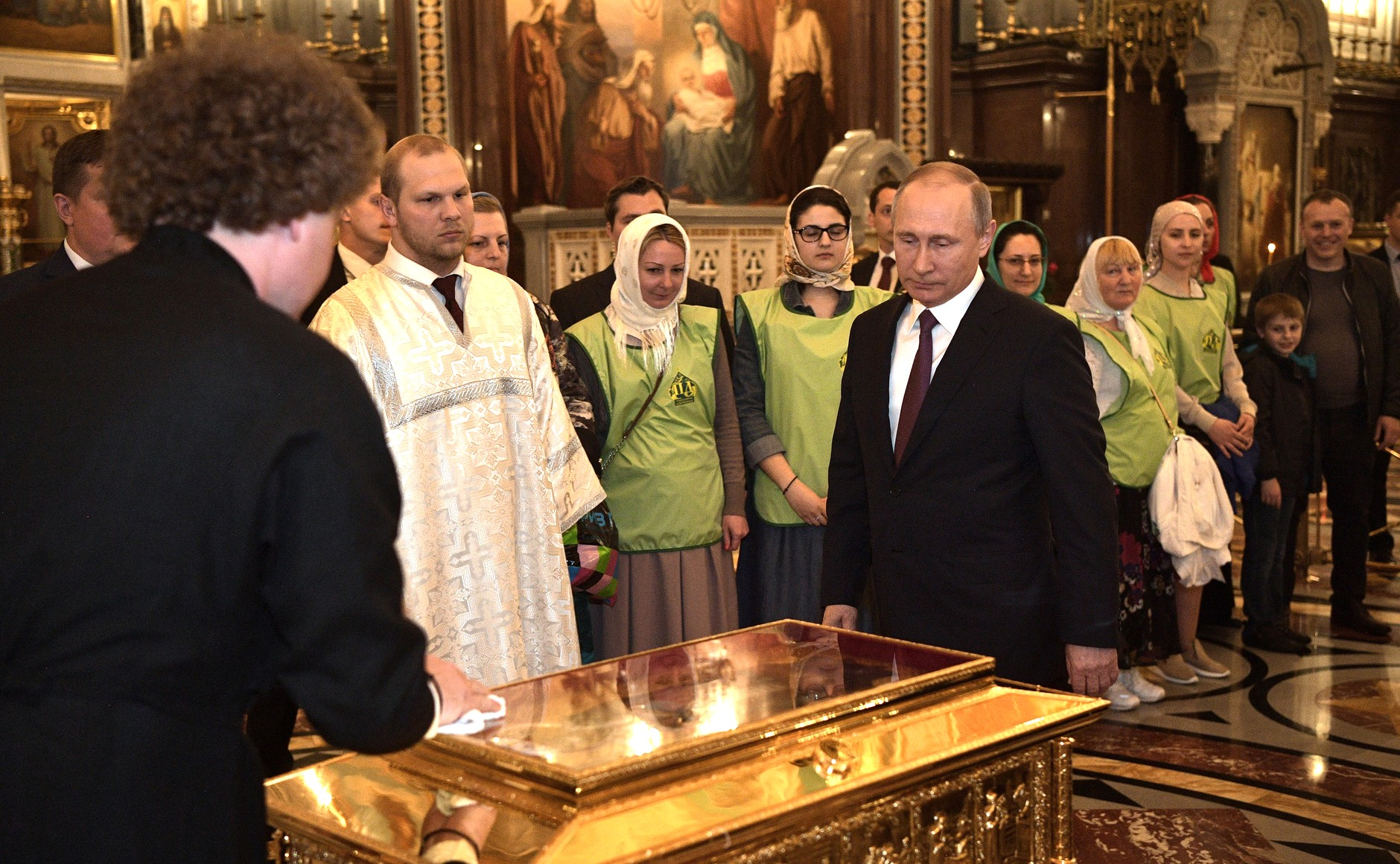 Во время посещения храма Христа Спасителя. Президент России Владимир Путин возле ковчега с мощами святителя Николая